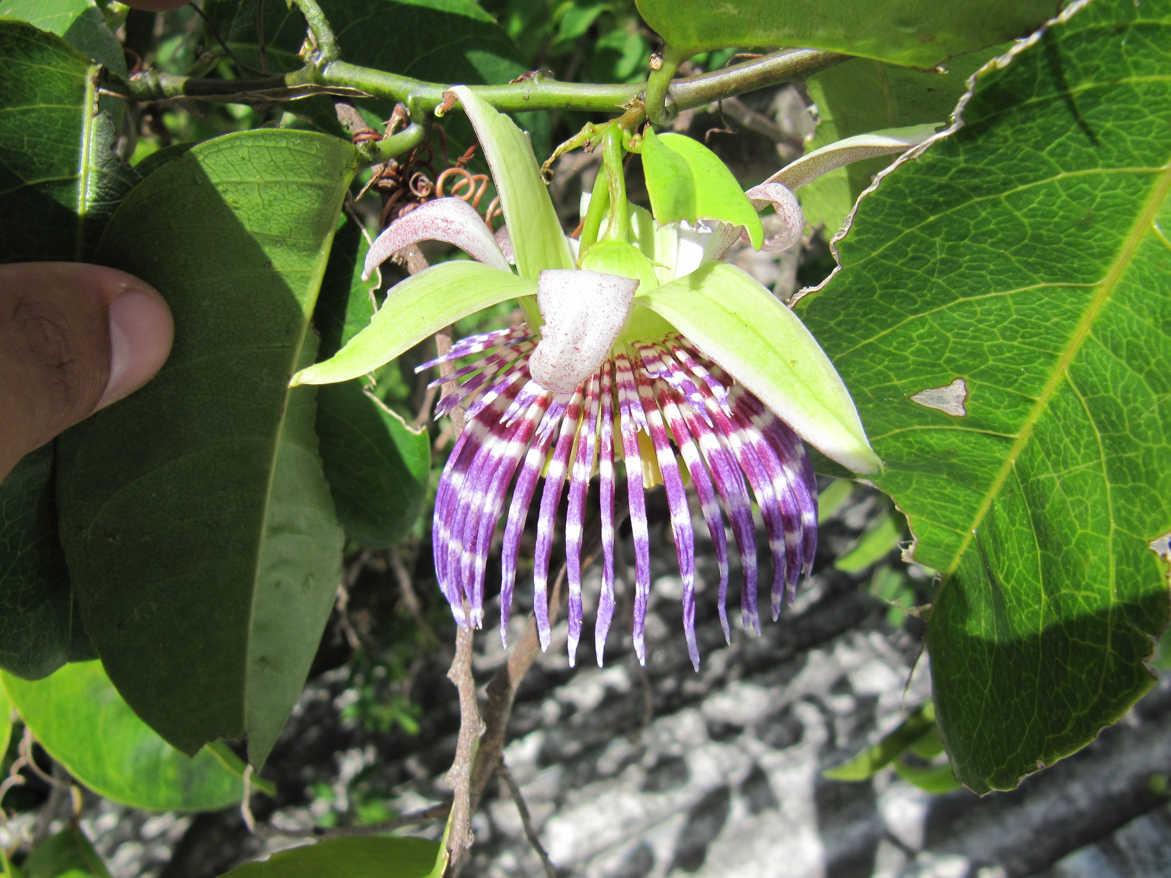 Fleur de la Pomme Lianne de Guadeloupe vue de dessus (la fleur est pend sous la liane) - Passiflora Laurifolia Unknown